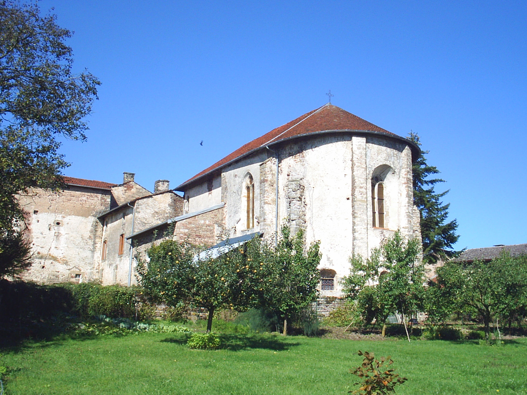 L'abbaye Saint-Maur de Bleurville.